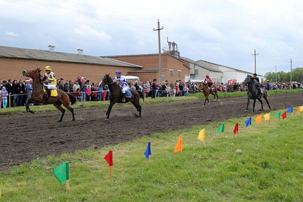 Скачки